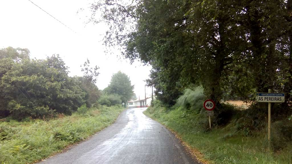 Vista das Pereiras, Curtis.